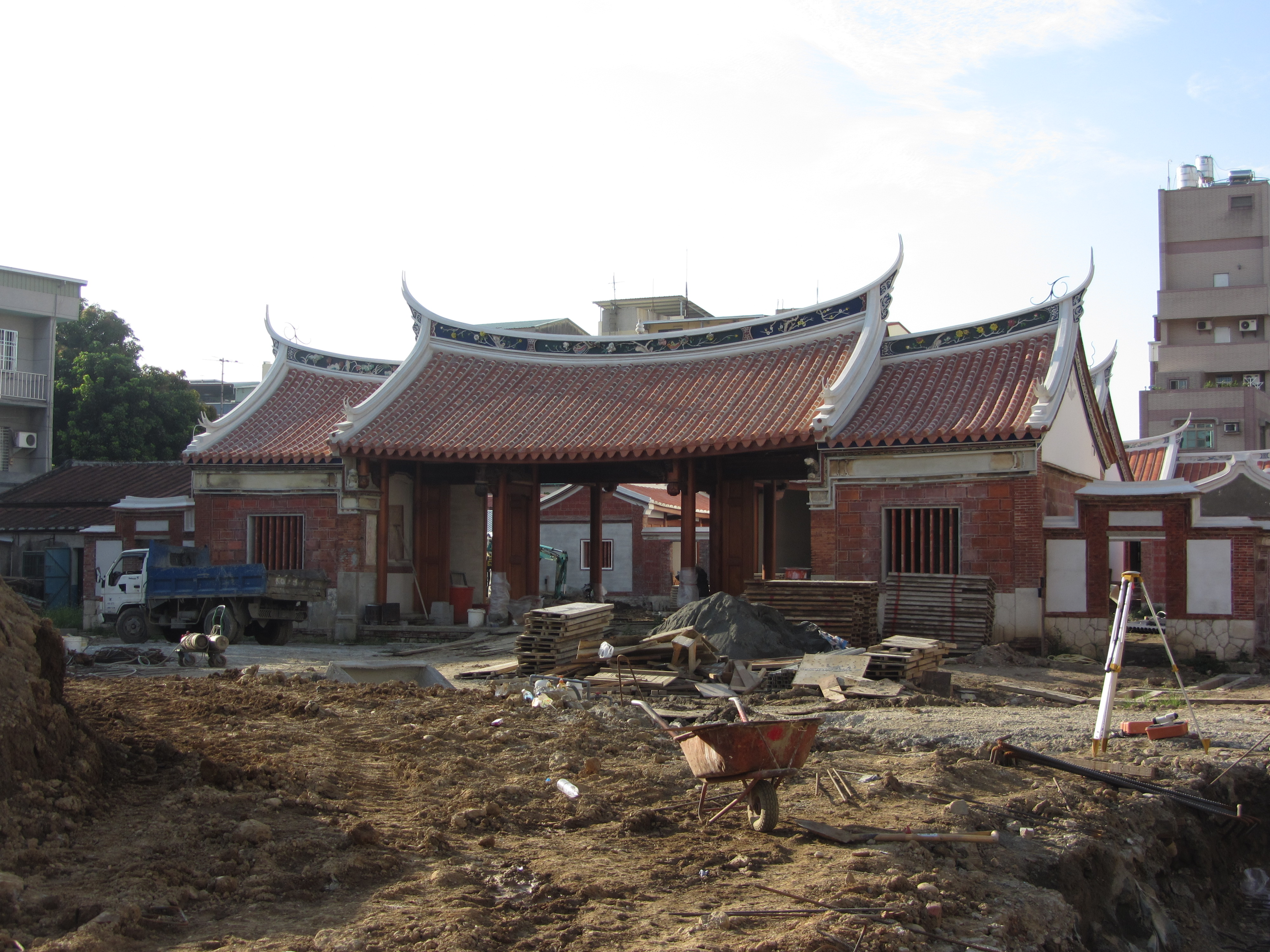 整修中的鳳儀書院